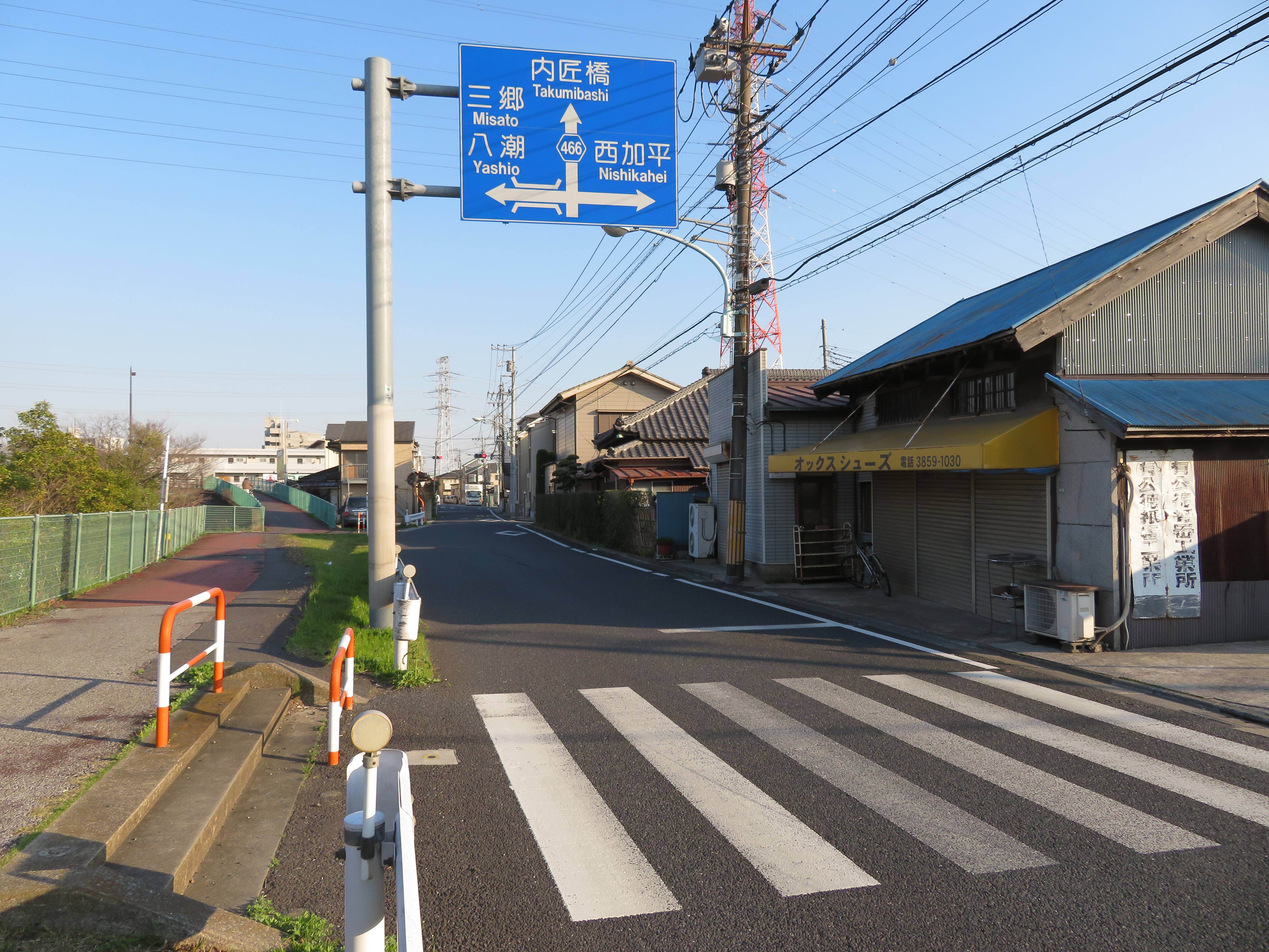 都道466号線 足立区南花畑4丁目付近（内匠橋方面を撮影）